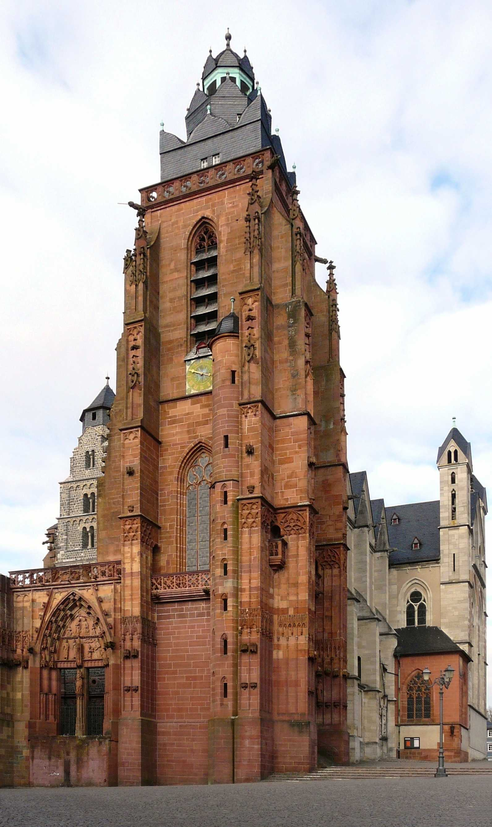 Gesamtansicht von Südwesten des Wetzlarer Doms, Wetzlar (Hessen)